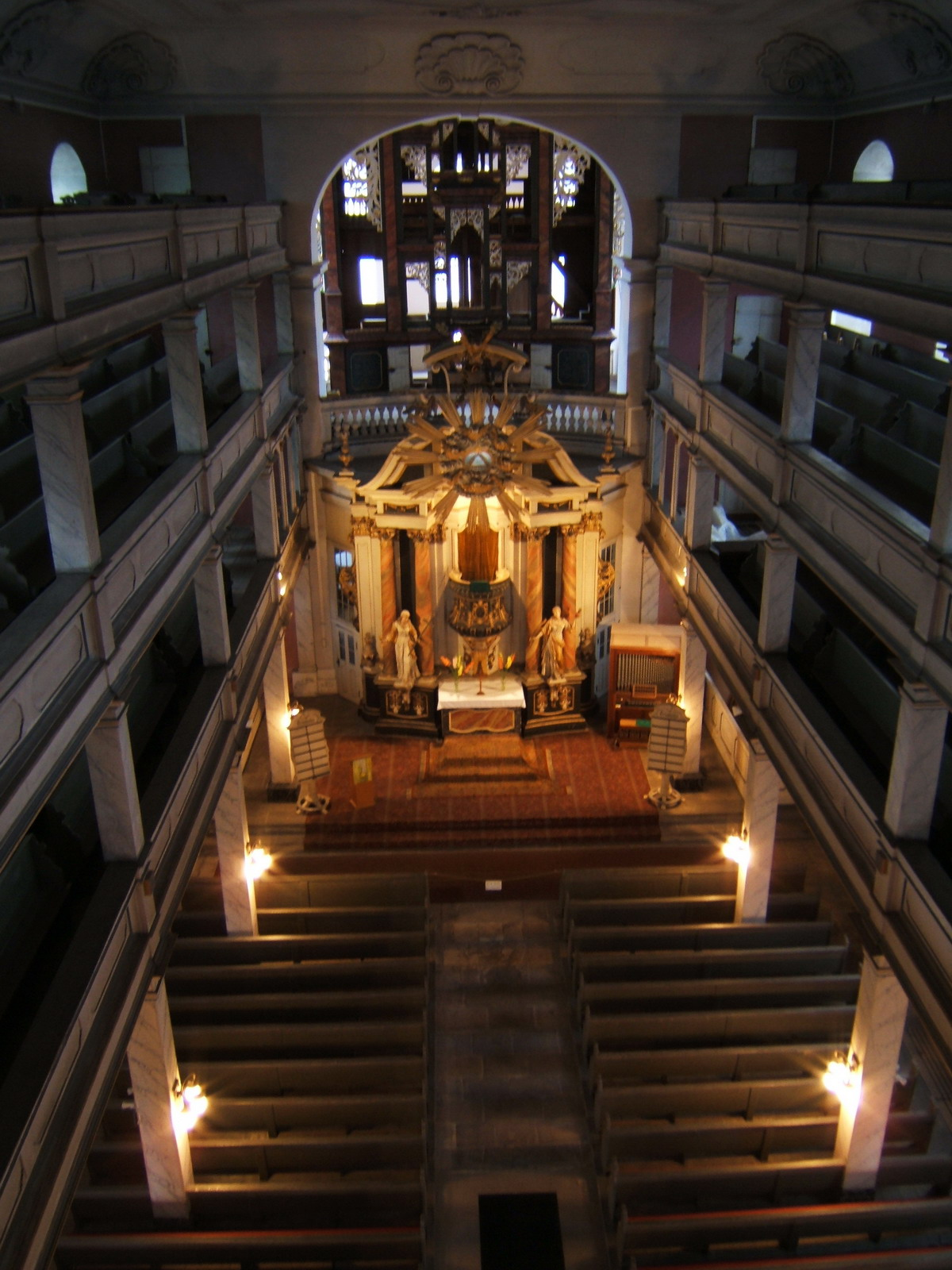 In der Kreuzkirche in Suhl.